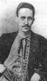 Ukrainian painter Yulian Pankevich (1863-1933)